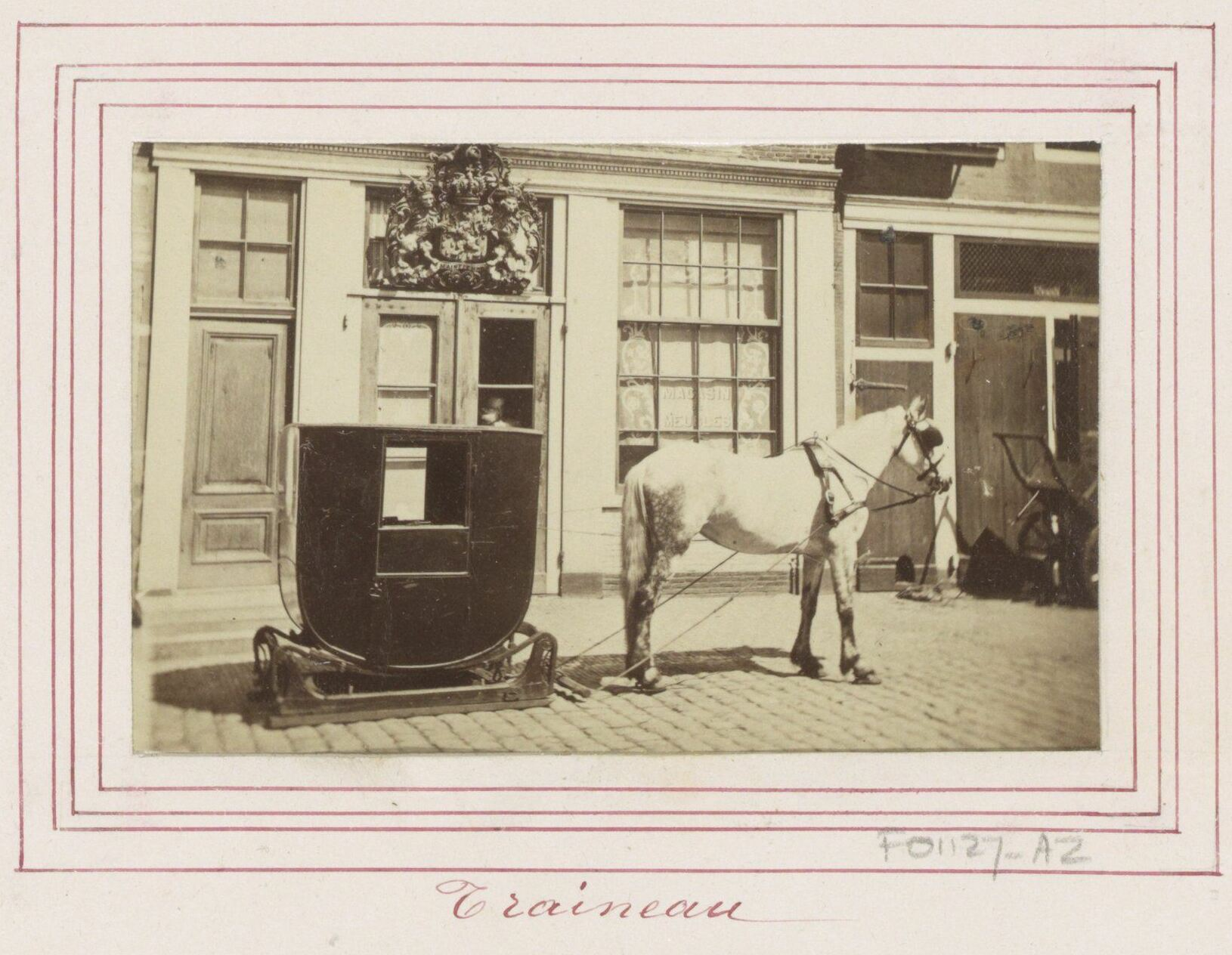 IdentificatieTitel(s): Toeslede (sleepkoets) op straat in AmsterdamObjecttype: foto Objectnummer: RP-F-F01127-AZOmschrijving: Onderdeel van Album met foto's en litho's van beziensWaar: digheden in Noord- en Zuid-Hollandse steden, schilderijen en klederdrachten.VervaardigingVervaardiger: fotograaf: Andries Jageruitgever: Andries JagerPlaats vervaardiging: AmsterdamDatering: ca. 1870Fysieke kenmerken: albuminedrukMateriaal: fotopapier Techniek: albuminedrukAfmetingen: passe-partout: h 54 mm × b 86 mmOnderwerpWat: horse-sleighanimal-drawn sledge (Dutch: 'toeslede')WaarAmsterdamVerwerving en rechtenVerwerving: overdracht van beheer 1994Copyright: Publiek domein